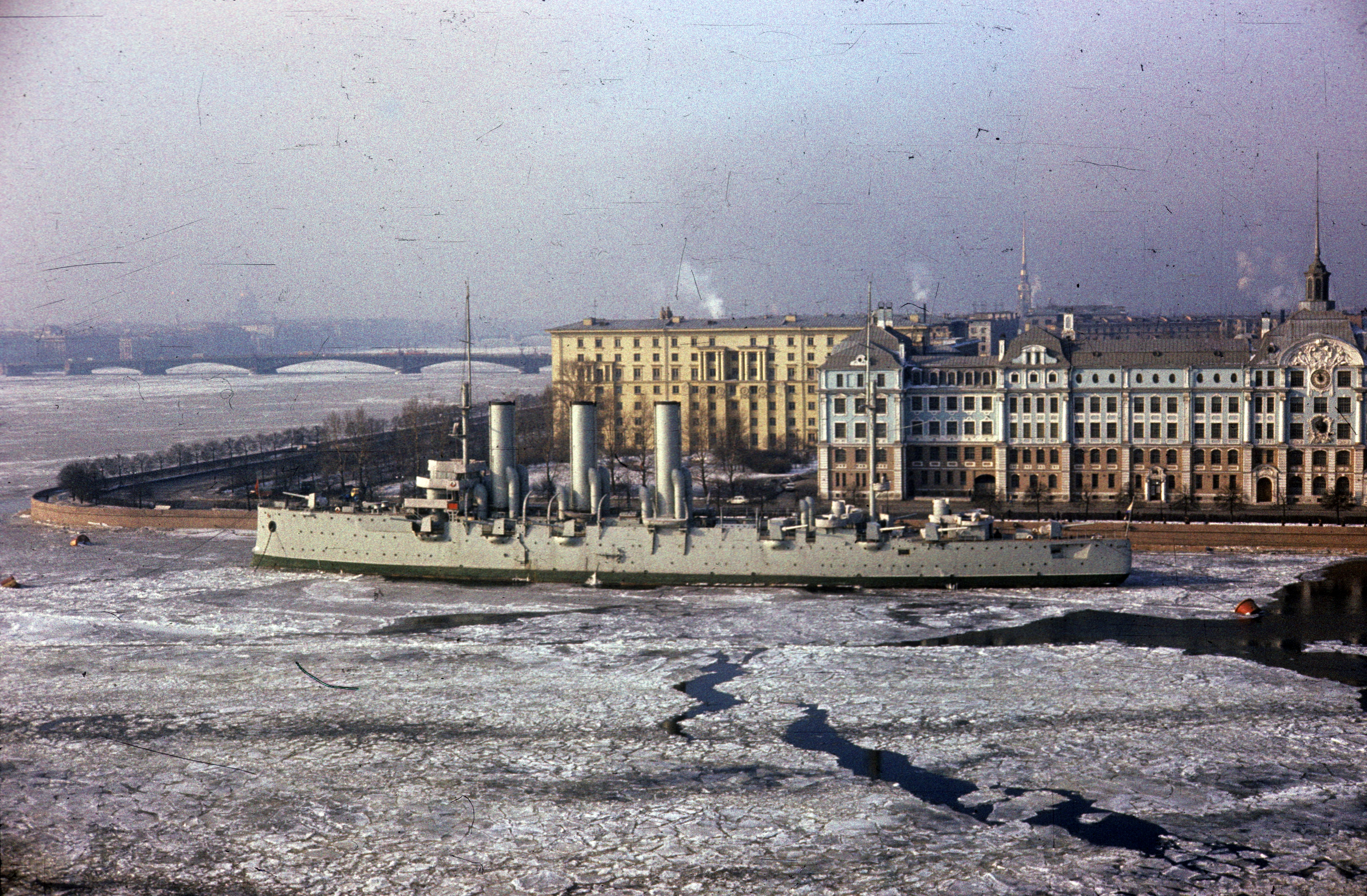 (Leningrád), Auróra cirkáló a Néva folyón. Location: Russia, St. Petersburg Tags: colorful, ship, warship, cruise ship, river, Aurora-ship Title: (Leningrád), Auróra cirkáló a Néva folyón.